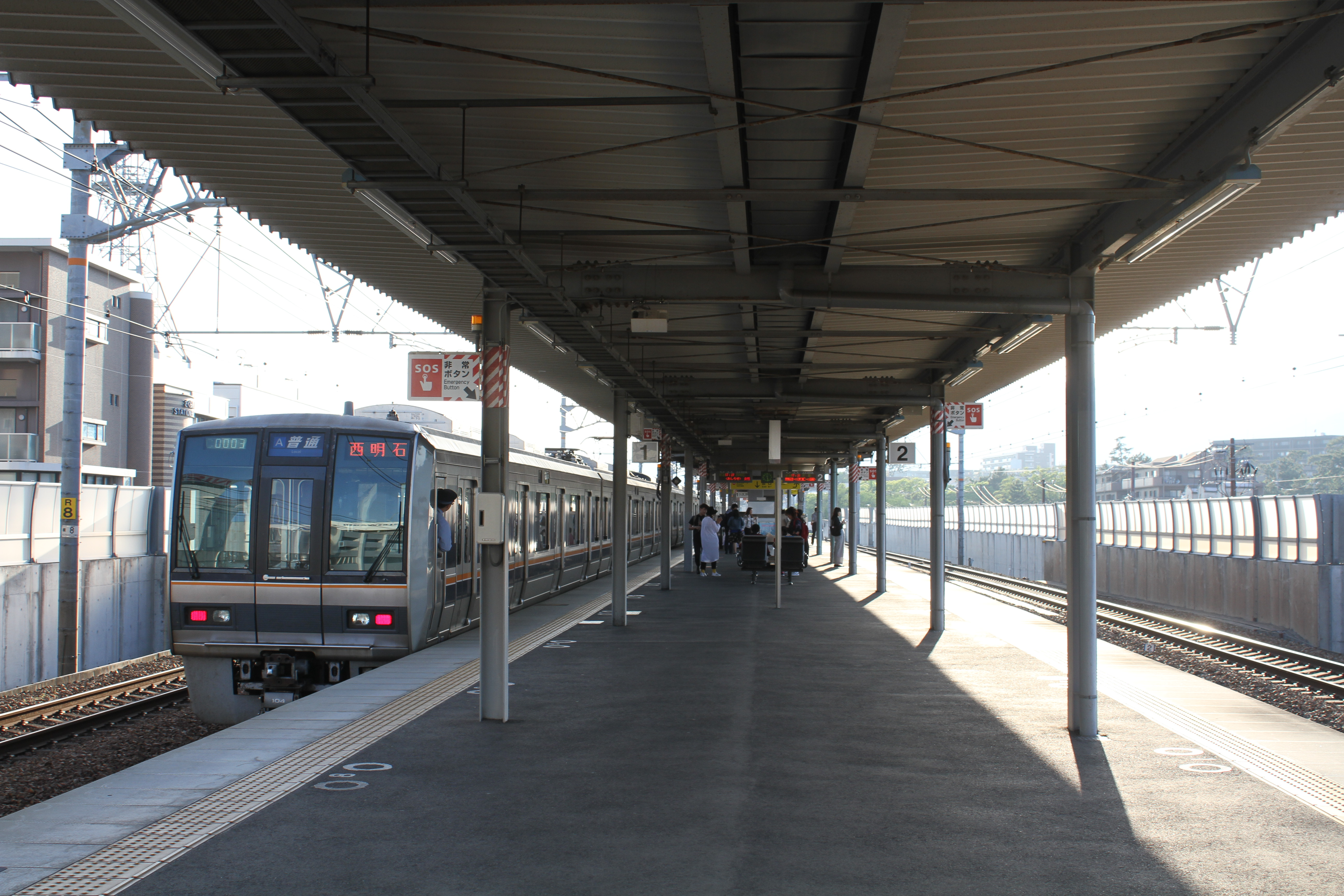 さくら夙川駅のホームです。左側（1番のりば）には三ノ宮方の電車、右側（2番のりば）には大阪方の電車がきます。